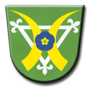 Kozárov znak